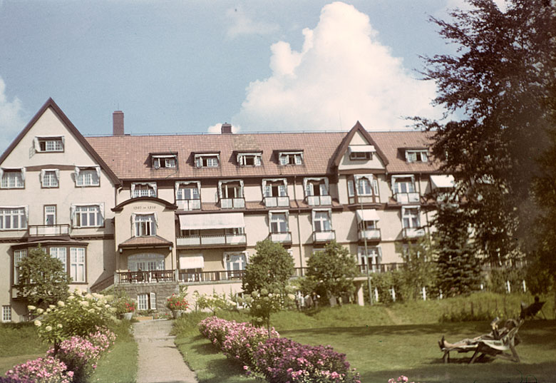 Ulricehamns sanatorium, även känt som Kurhotellet, var en av Europas största träbyggnader. Revs 1981. Motiv: Ulricehamn Nyckelord: Riksintressen Kategori: Stadsmiljö, HotellUlricehamns sanatorium, även känt som Kurhotellet, var en av Europas största träbyggnader. Revs 1981.